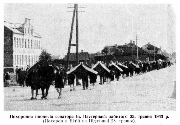 Procesja pogrzebowa senatora II RP Iwana Pasternaka w Białej Podlaskiej (28 maja 1943)